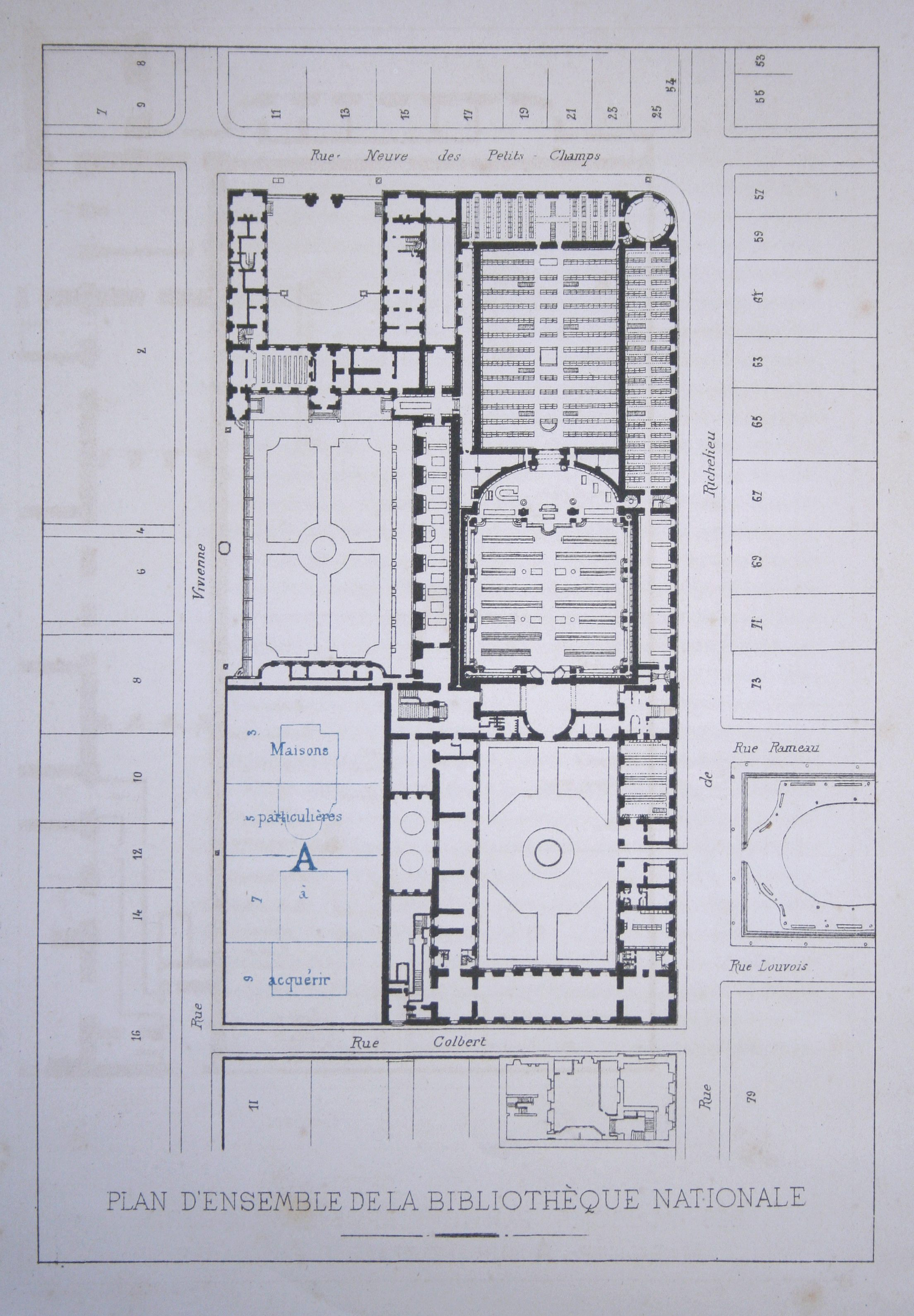 Plan de la Bibliothèque nationale vers 1880 (projet d'agrandissement) exemplaire conservé à la bibliothèque patrimoniale de Gray (France).